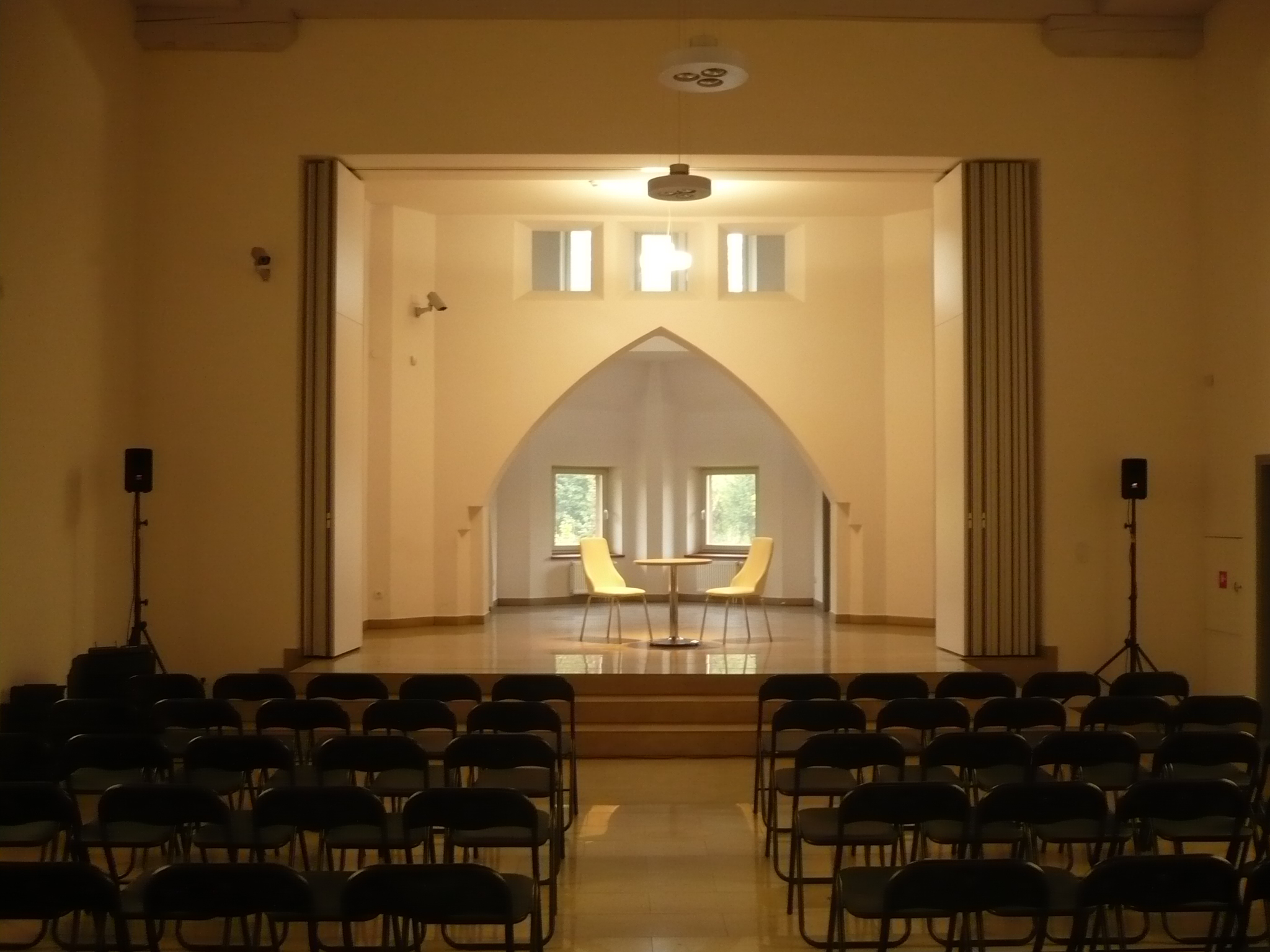 Muzeum Ziemi Sowiogórskiej w Ludwikowicach Kłodzkich